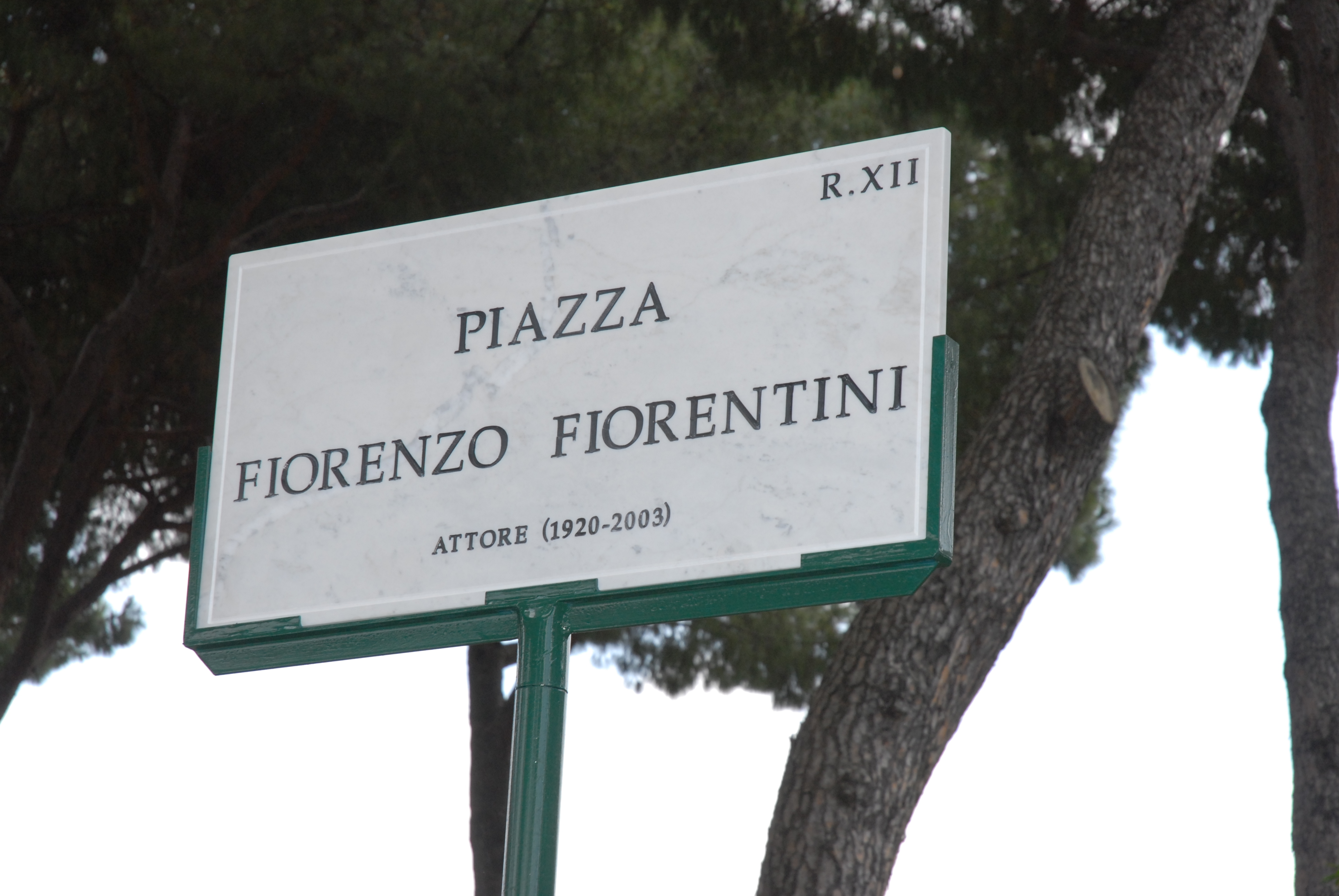 Targa dedicata a Fiorenzo Fiorentini al Giardino degli aranci